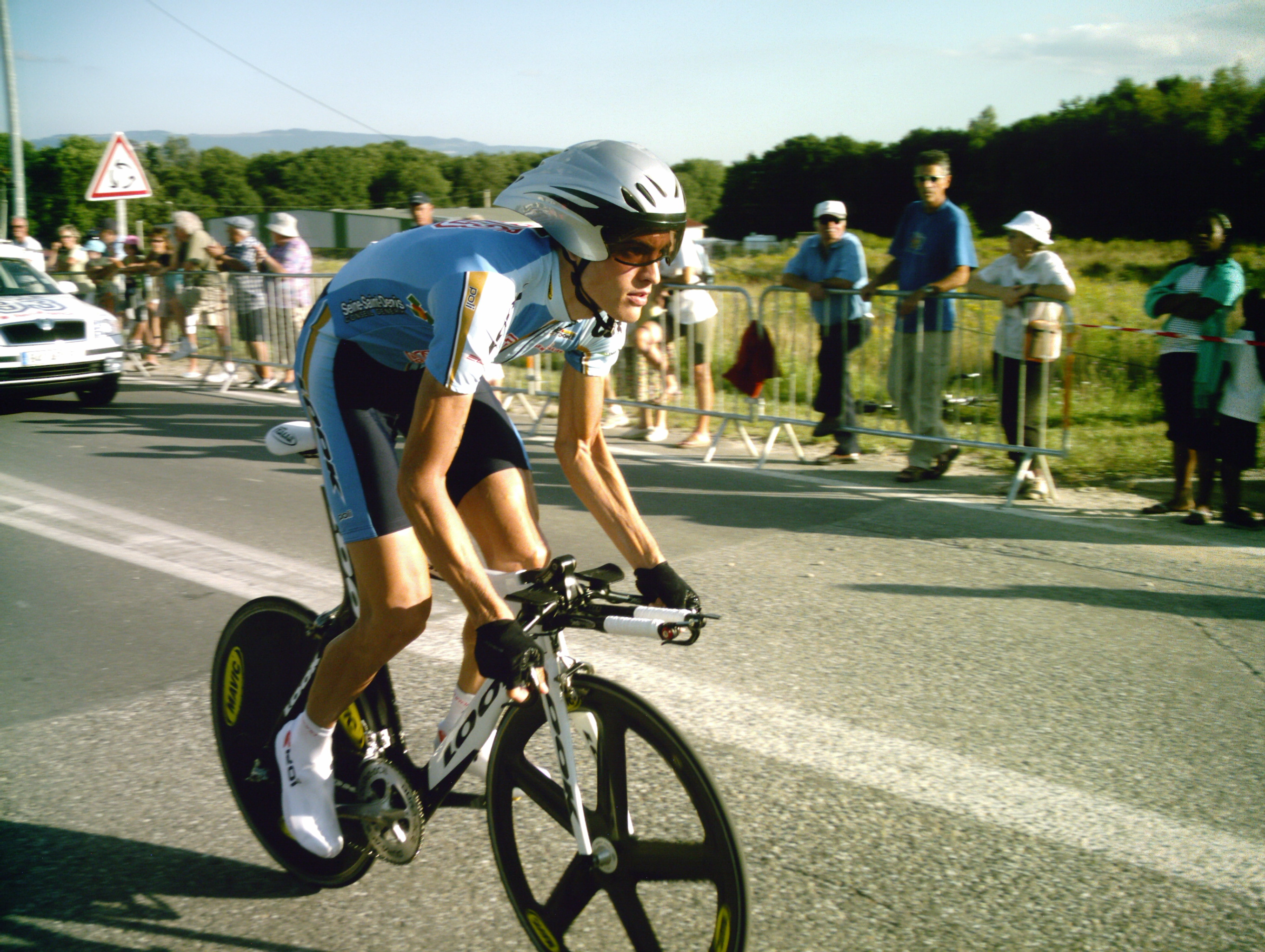 Niels Brouzes au départ du contre-la-montre de la troisième étape b du Tour de l'Ain 2009.